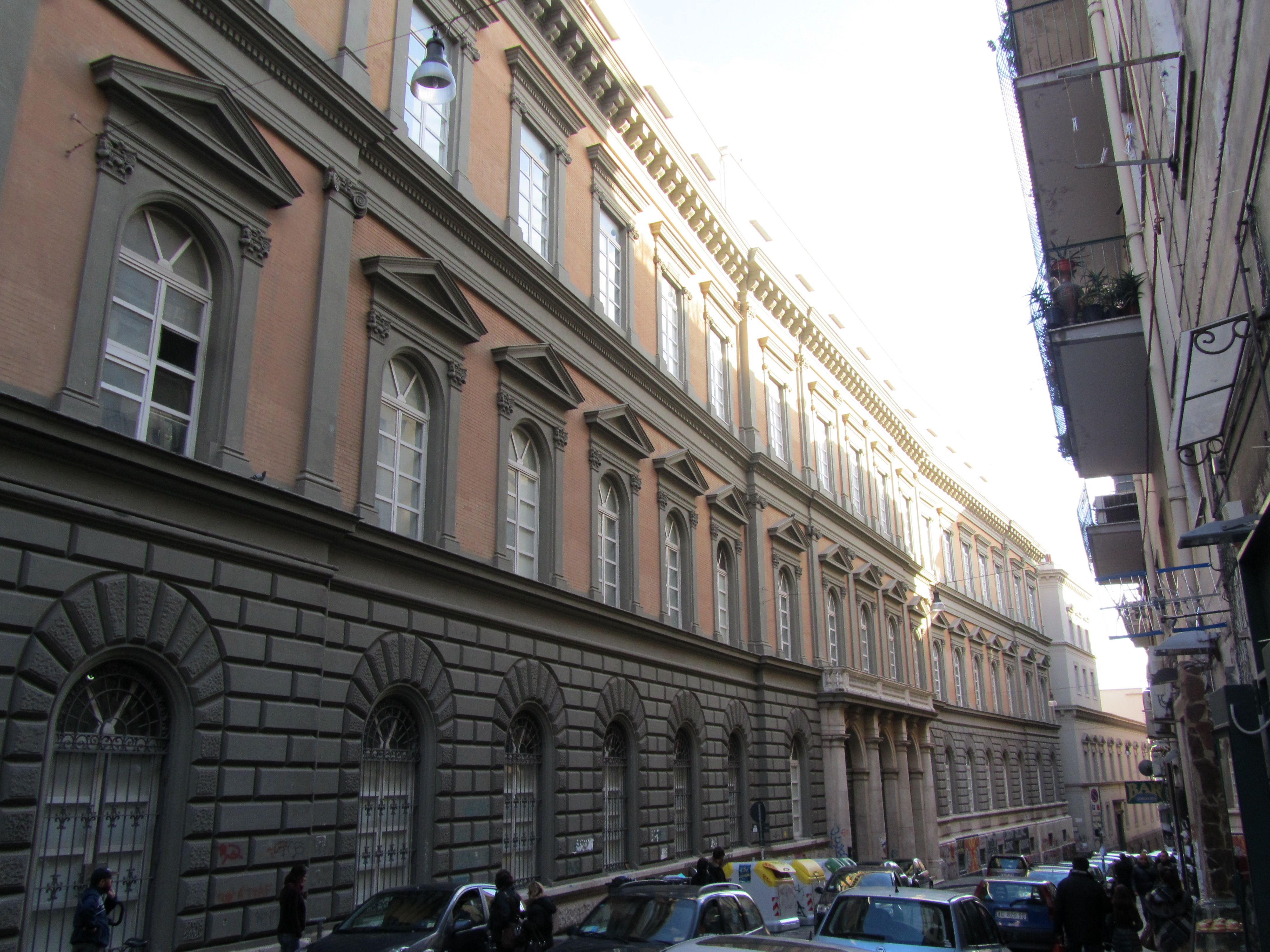 Palazzo dell'Università di biotecnologia di Napoli (Federico II)